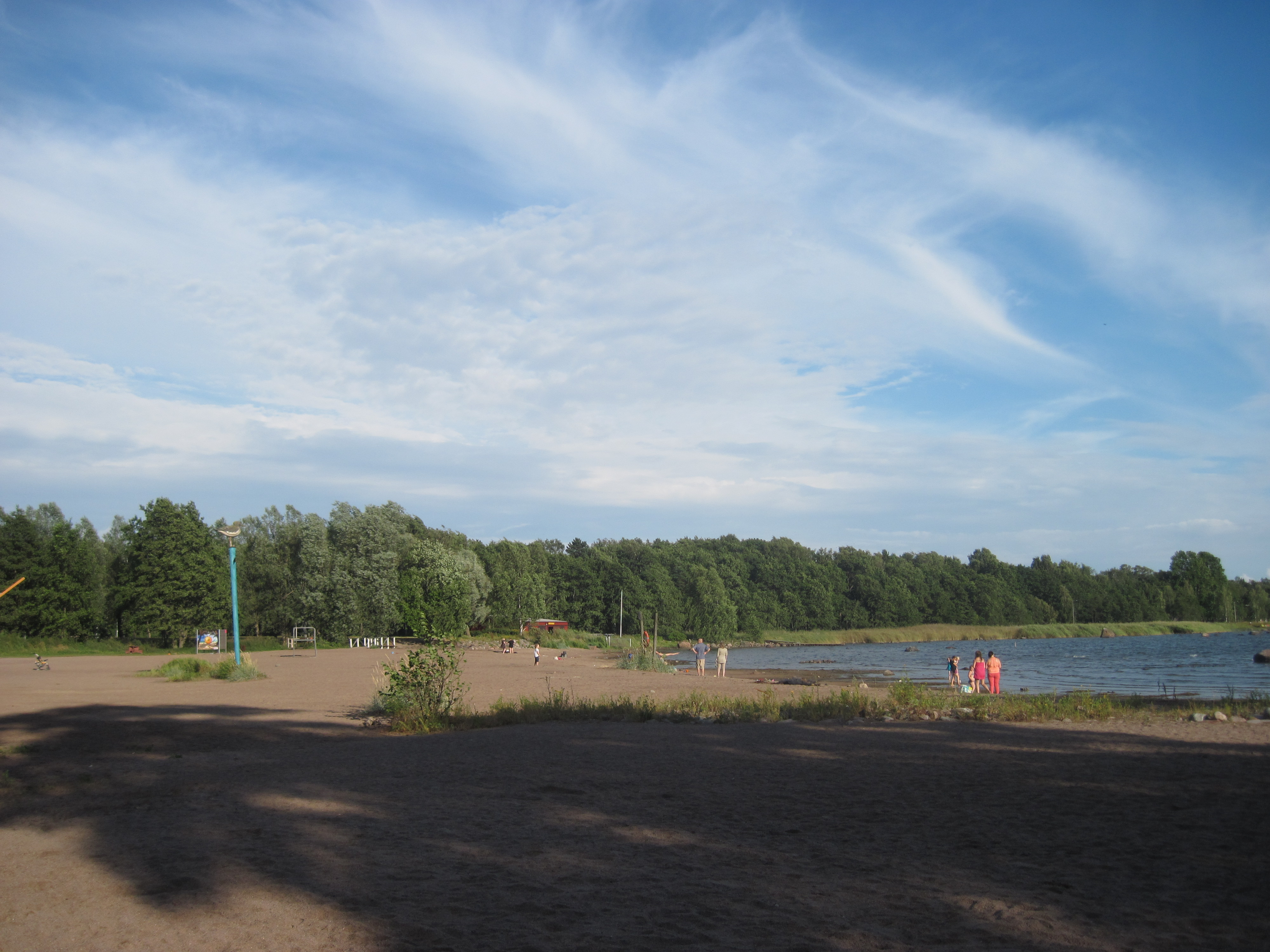 Merikylpylä Park in Lauttasaari, Helsinki, as seen from West